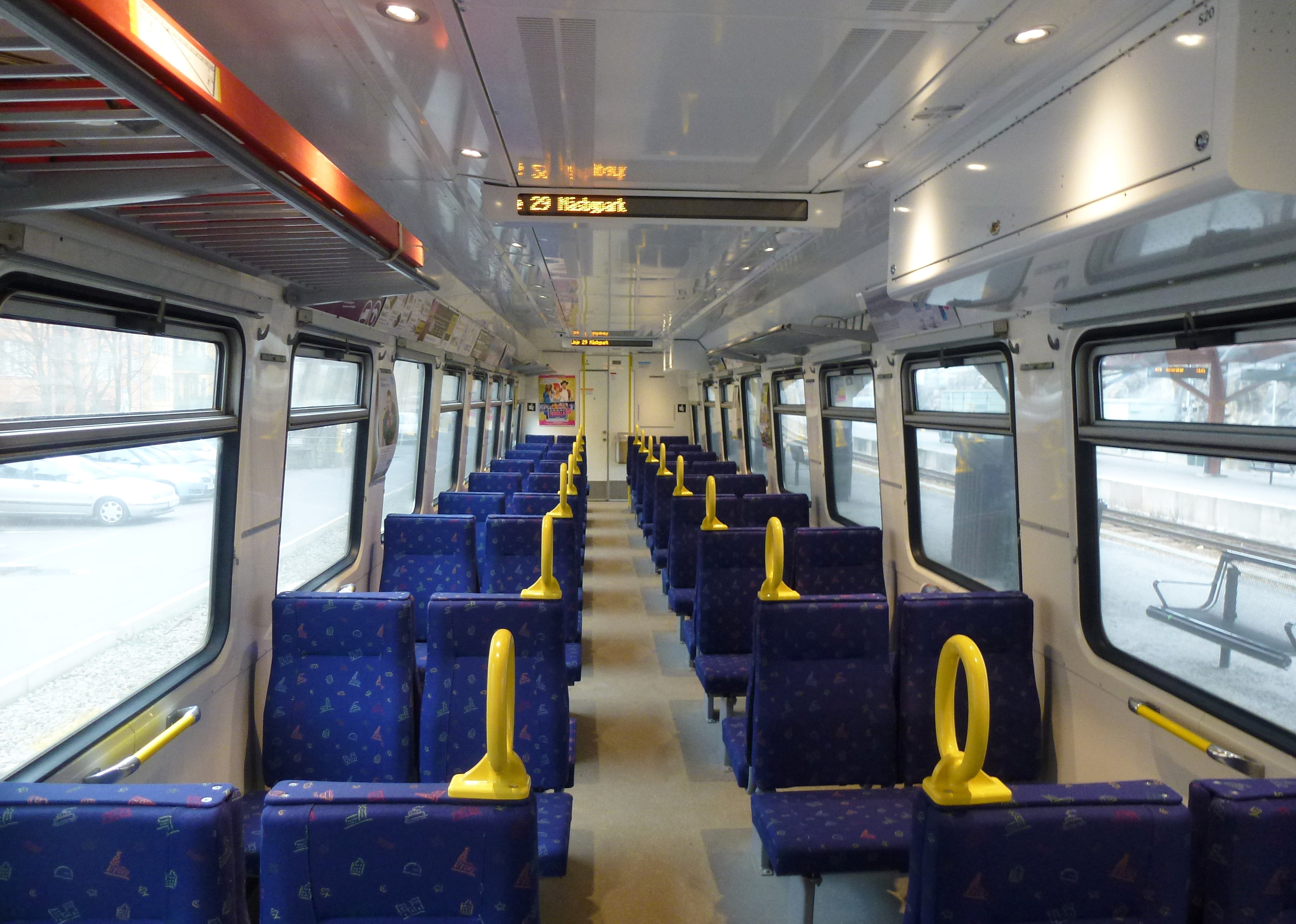 Roslagsbanan interiör, vagn